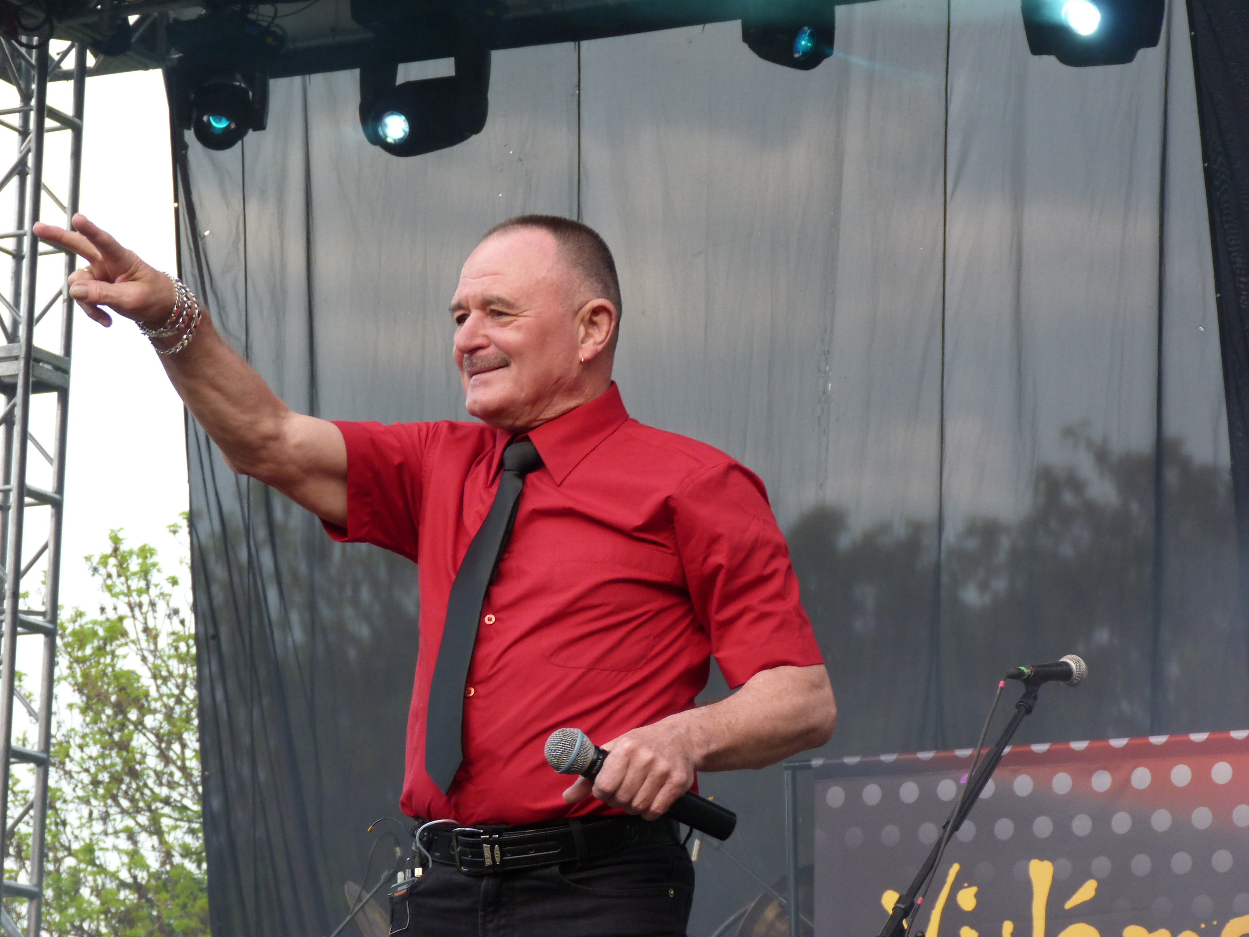 A felvétel 2014. május 1 -én csütörtökön készült Budapesten, a Tabánban. Az év évente szokásos koncerten mások mellett Török Ádám és a Mini, Nagy Feró és a Beatrice lépett fel. ©© Derzsi Elekes Andor, Budapest, 2014, A kép és filmfelvételek egészben, vagy részletekben másolását, bármilyen úton történő sokszorosítását és felhasználását a szerző ellenérték nélkül, jogutódjaira is kihatóan megengedi. Az engedély kiterjed a kereskedelmi célú hasznosításra is. Kéri azonban nevének feltüntetését a felhasználás során. A Metapolisz sorozat valamennyi képe és filmje Creative Commons alatti valamint kereskedelmi - for profit - célra is felhasználható. Ajánlott hivatkozás: Derzsi Elekes Andor: Metapolisz DVD line